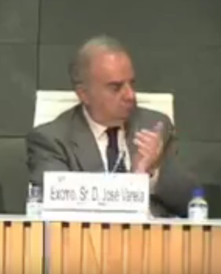 José Varela Ortega